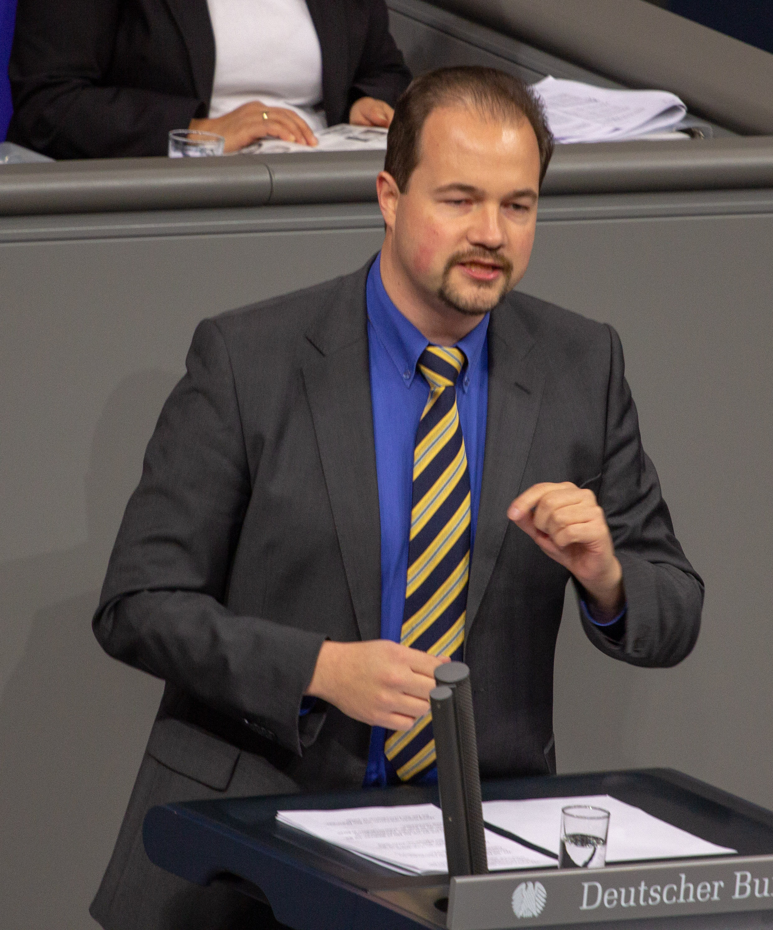 Martin Sichert, Mitglied des Deutschen Bundestages, während einer Plenarsitzung am 11. April 2019 in Berlin.